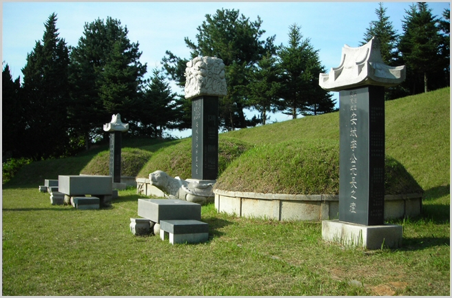 왼쪽부터 2世 이영, 시조 이중선, 3世 이원장의 묘이다.